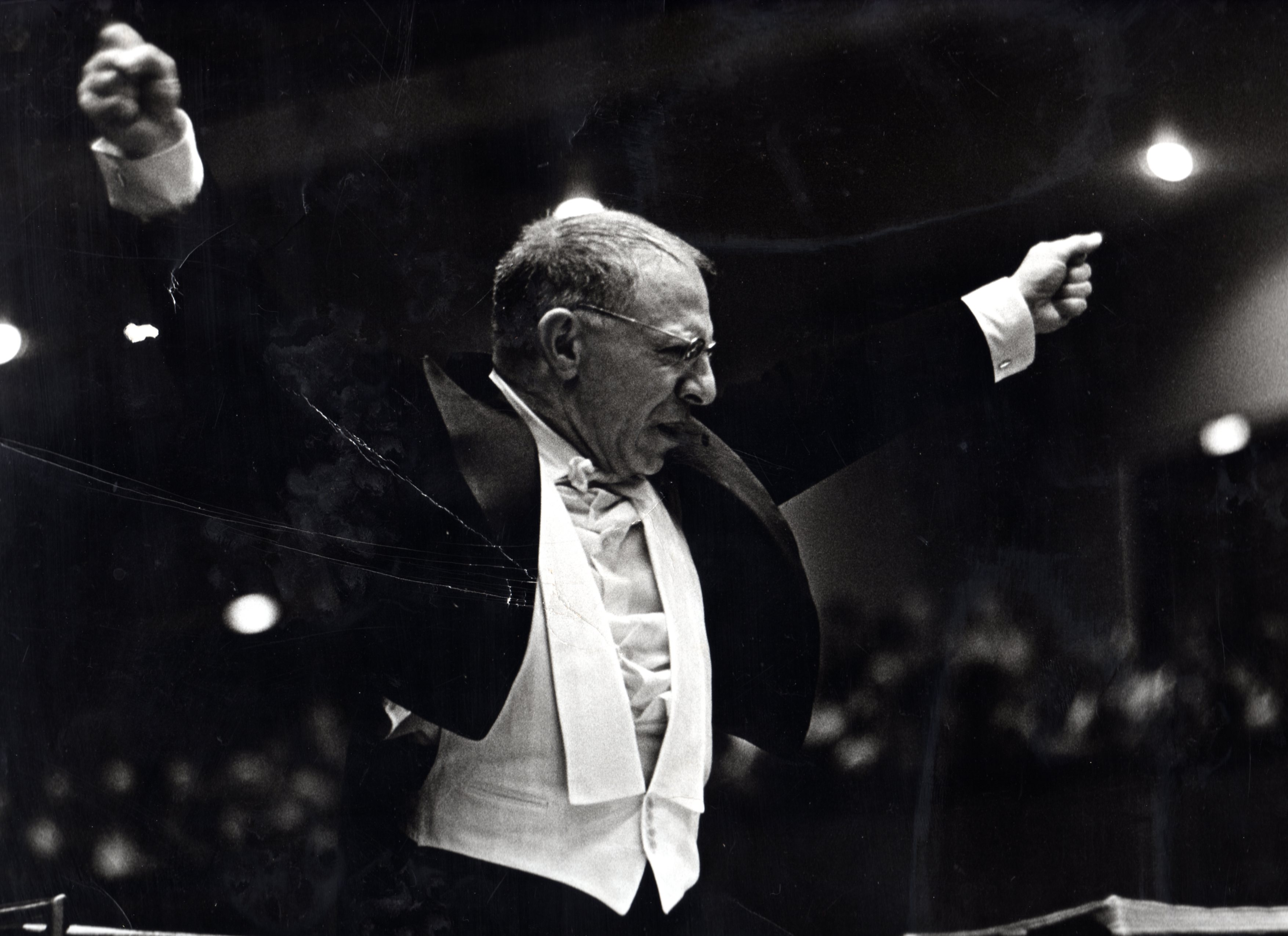 en répétition